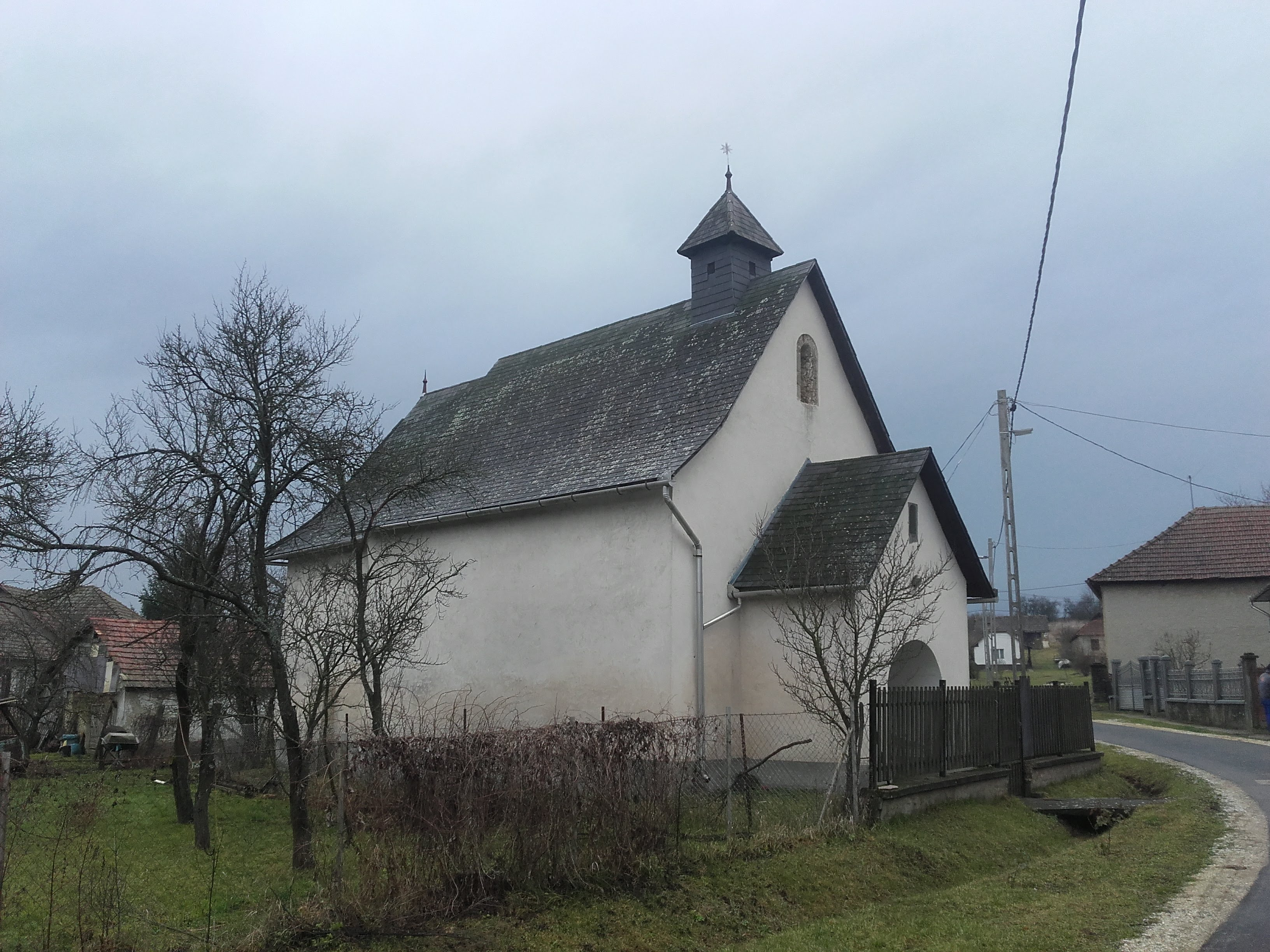 Romanic Reformed church in Abod, Hungary, built in 13th century This is a photo of a monument in Hungary. Identifier: 2638